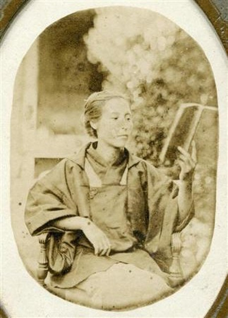 楠本イネの写真